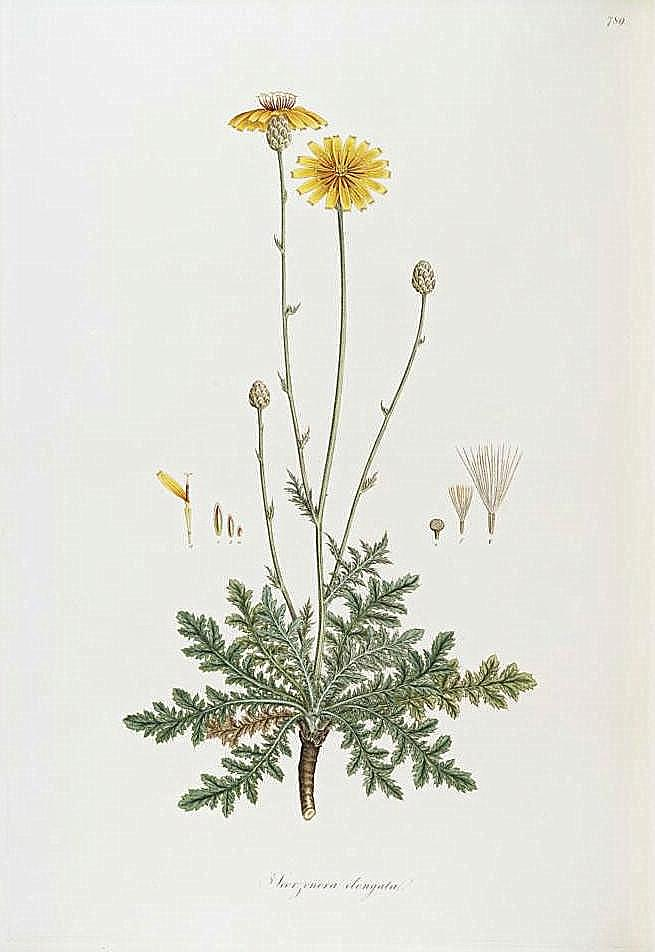 Hymenonema graecum en Flora Græca Sibthorpiana, London, 1806, tab. 789.